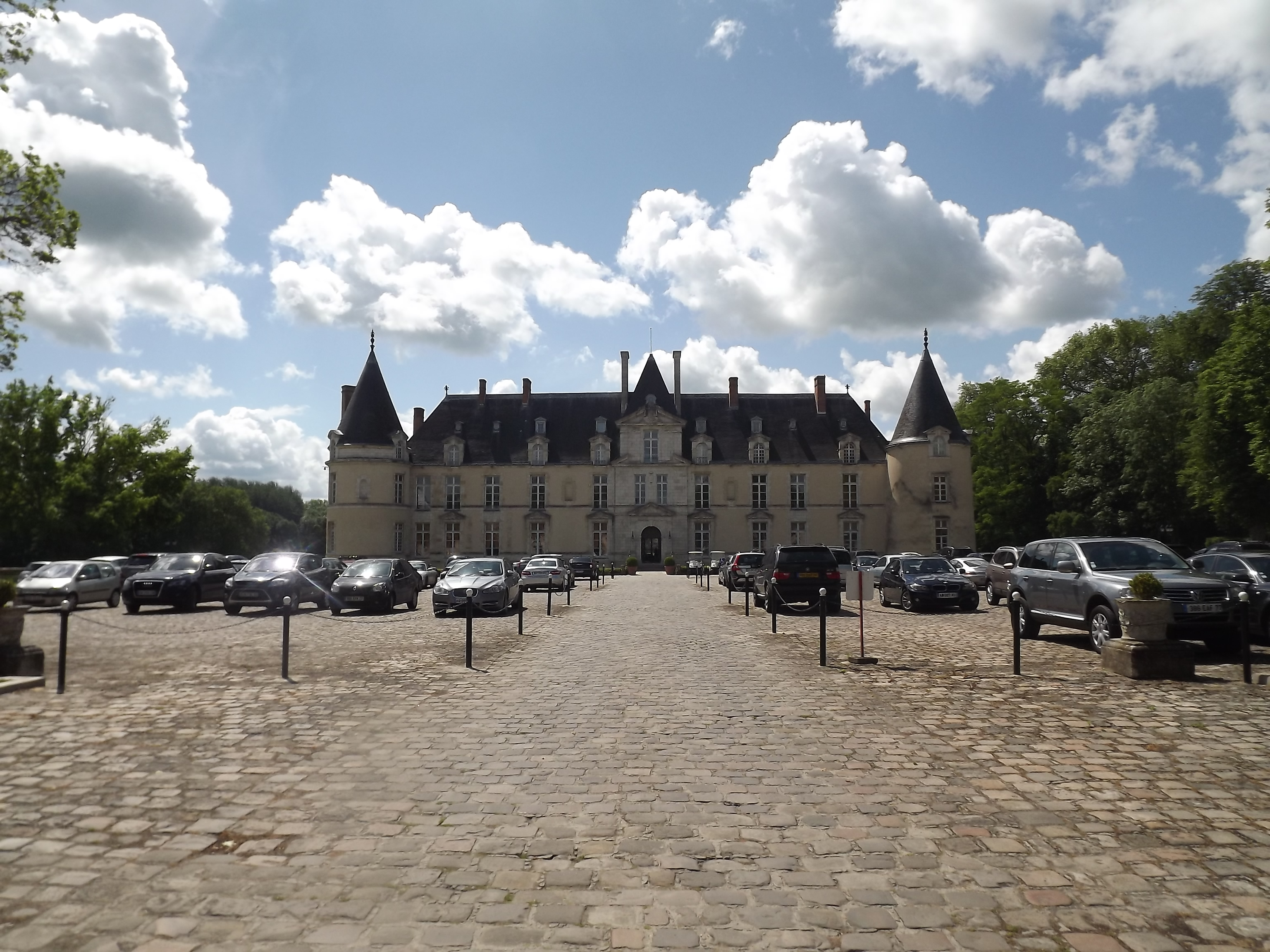 Vue de face du château d'Augerville